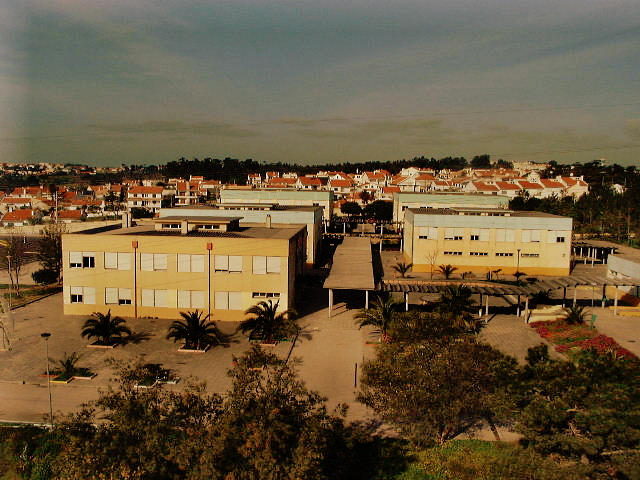 Escola Secundária Daniel Sampaio na Sobreda